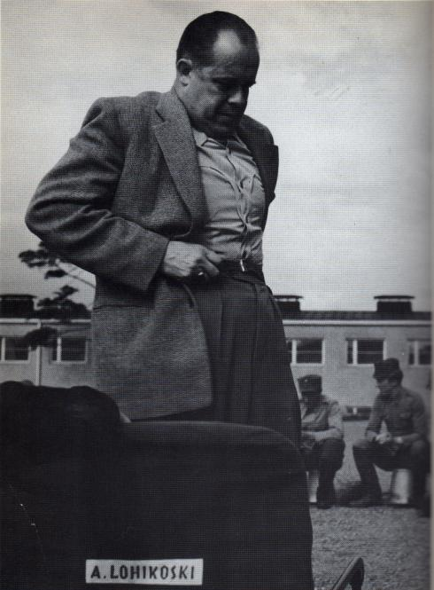 Suomalainen elokuvaohjaaja, käsikirjoittaja ja media-alan uranuurtaja Armand Lohikoski (1912-2005).